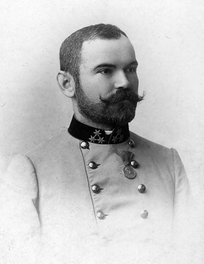 Кос Михайло — перший українець лікар-офтальмолог у Галичині